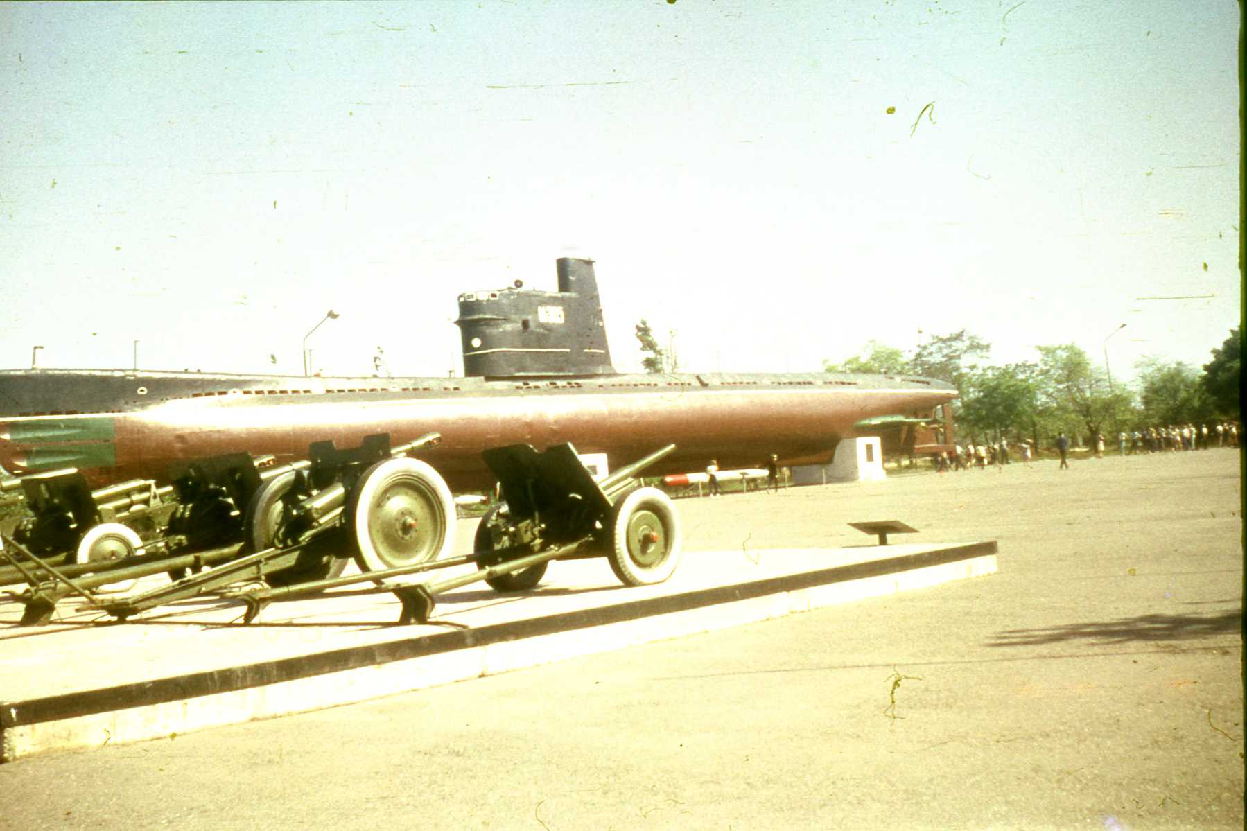 Soviet Quebec class submarine M-296 in Odessa